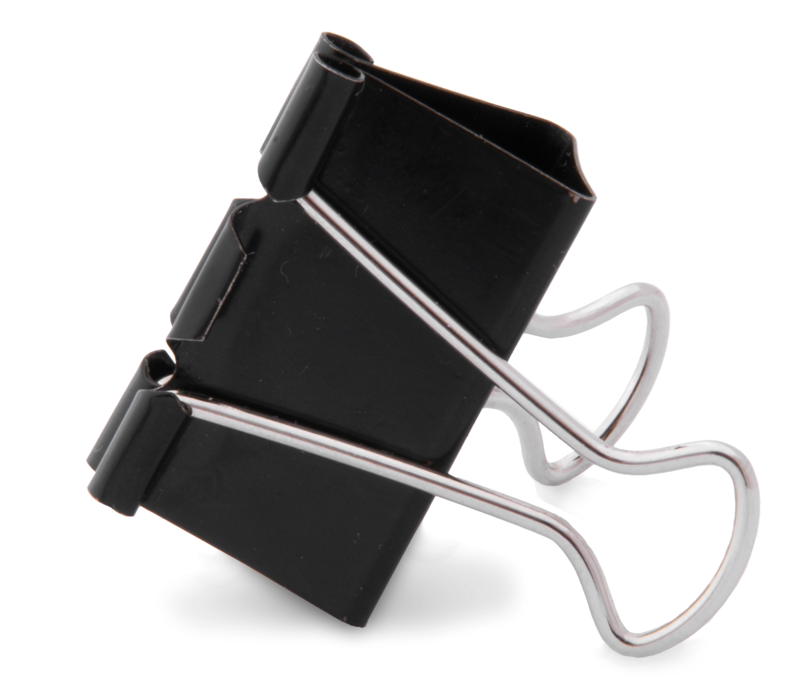 sponka